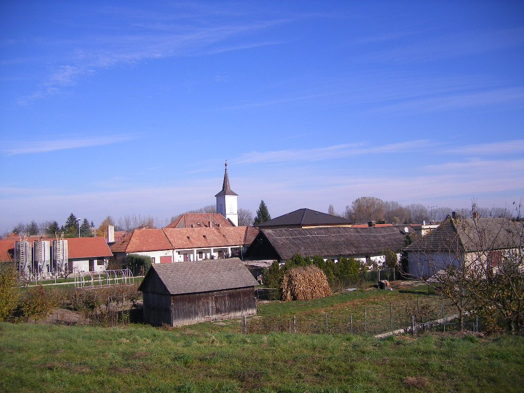 Szap - a falu látképe a Duna töltéséről